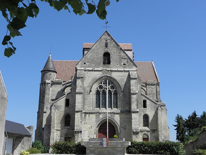 Façade occidentale de l'église Saint-Pierre et Saint-Paul de Mons-en-Laonnois (02).